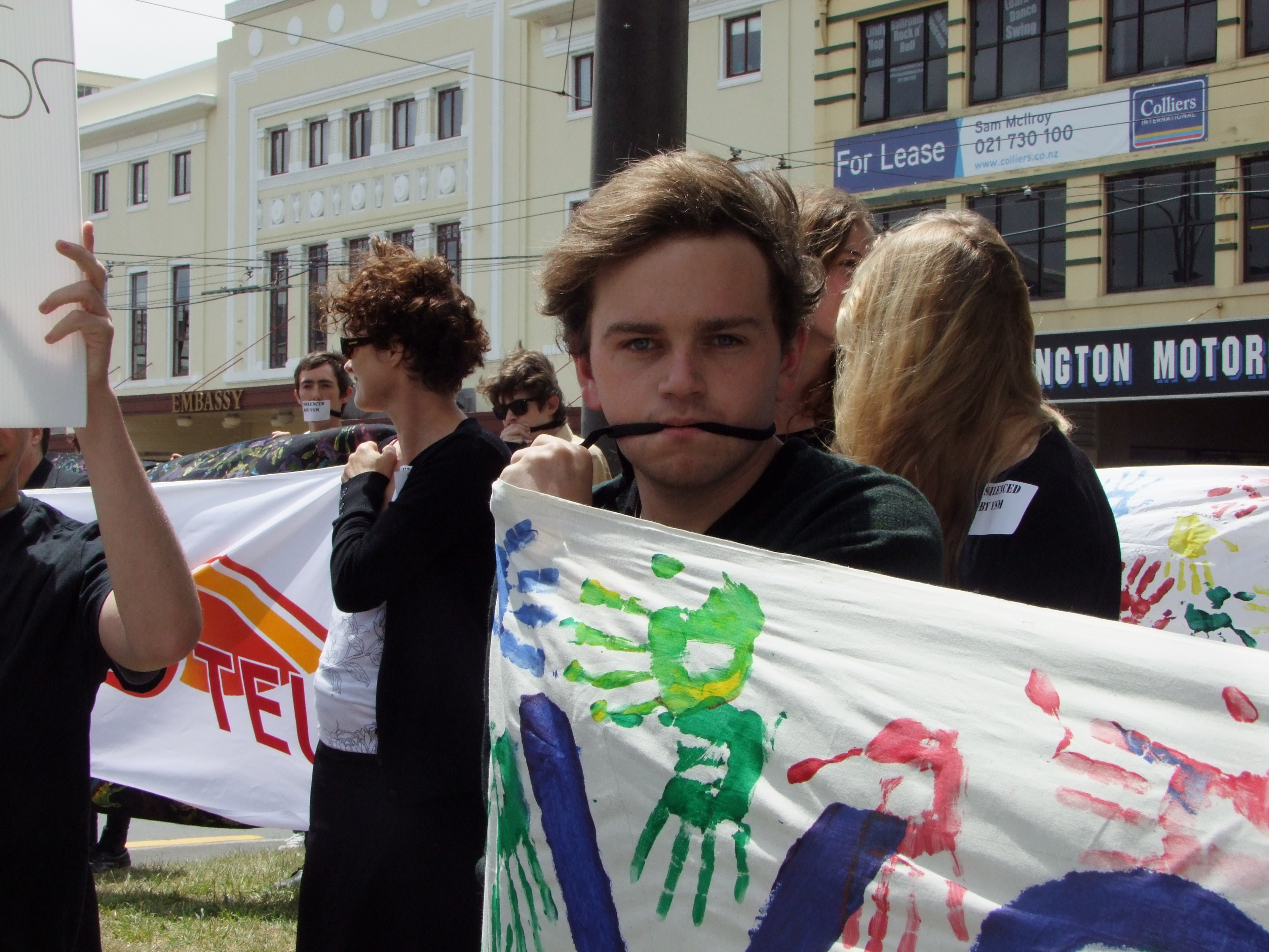 Max Hardy